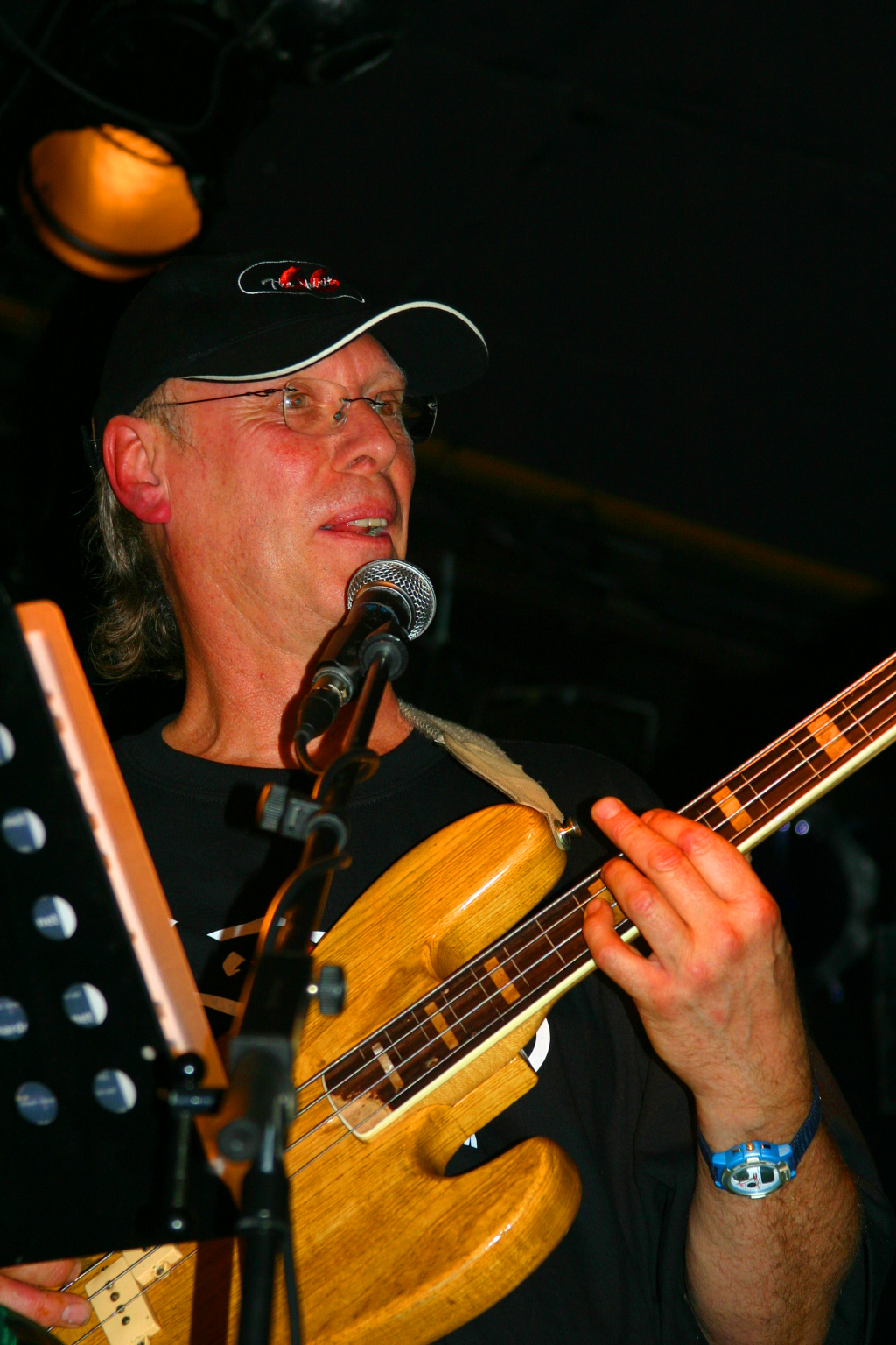 Richard Sinclair tijdens het concert met Hatfield and the North te Verviers (België). Eigen werk van 16.06.2005. Auteur: Jaak Geebelen